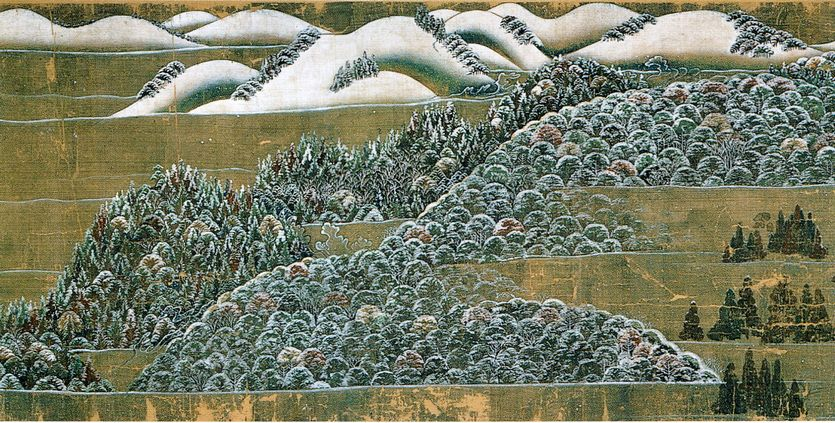 Rouleau 19 section 1 : paysage de montagnes enneigés proches du sanctuaire Kasuga.